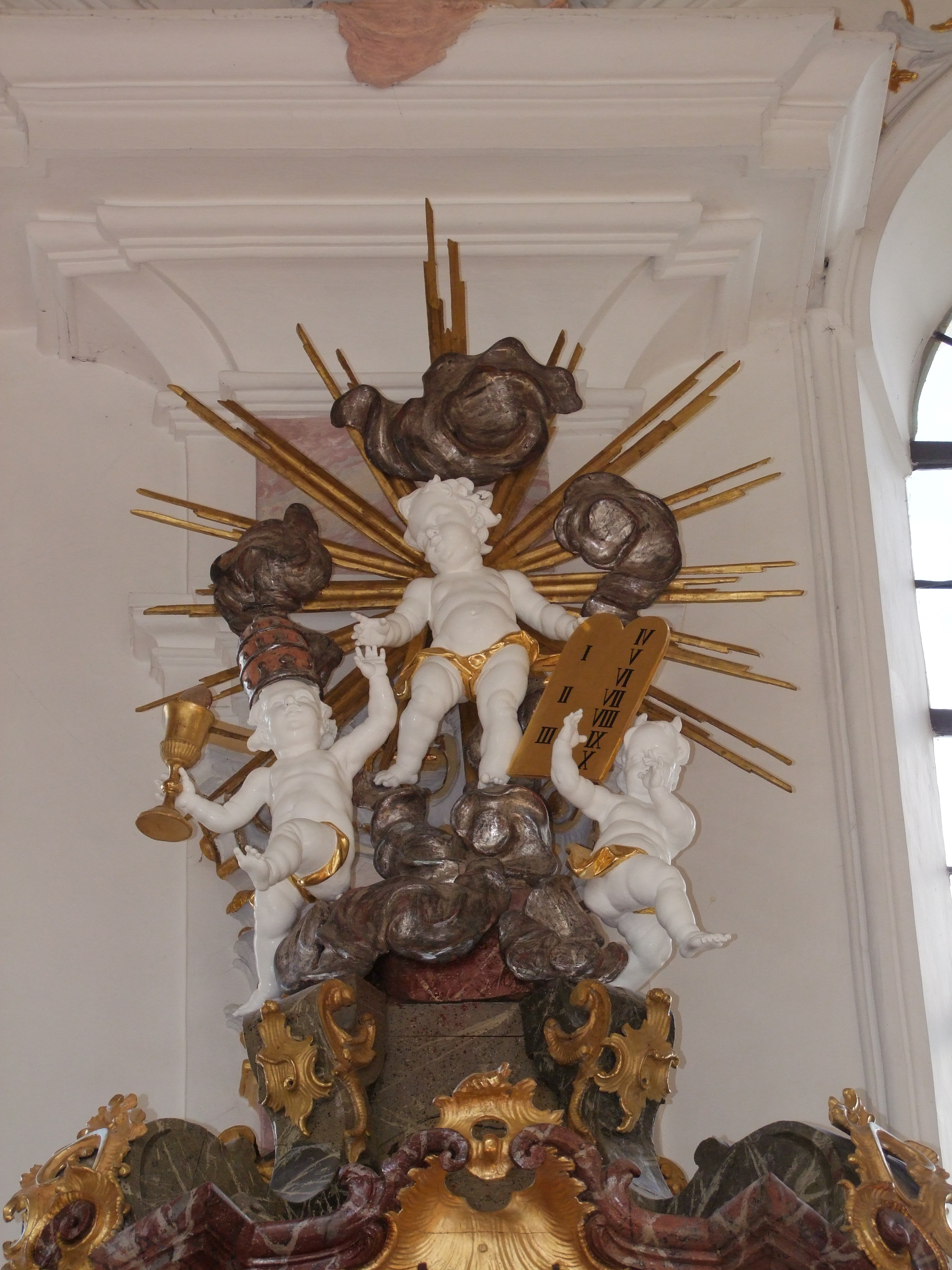 St. Magnus in Unterrammingen in Oberschwaben